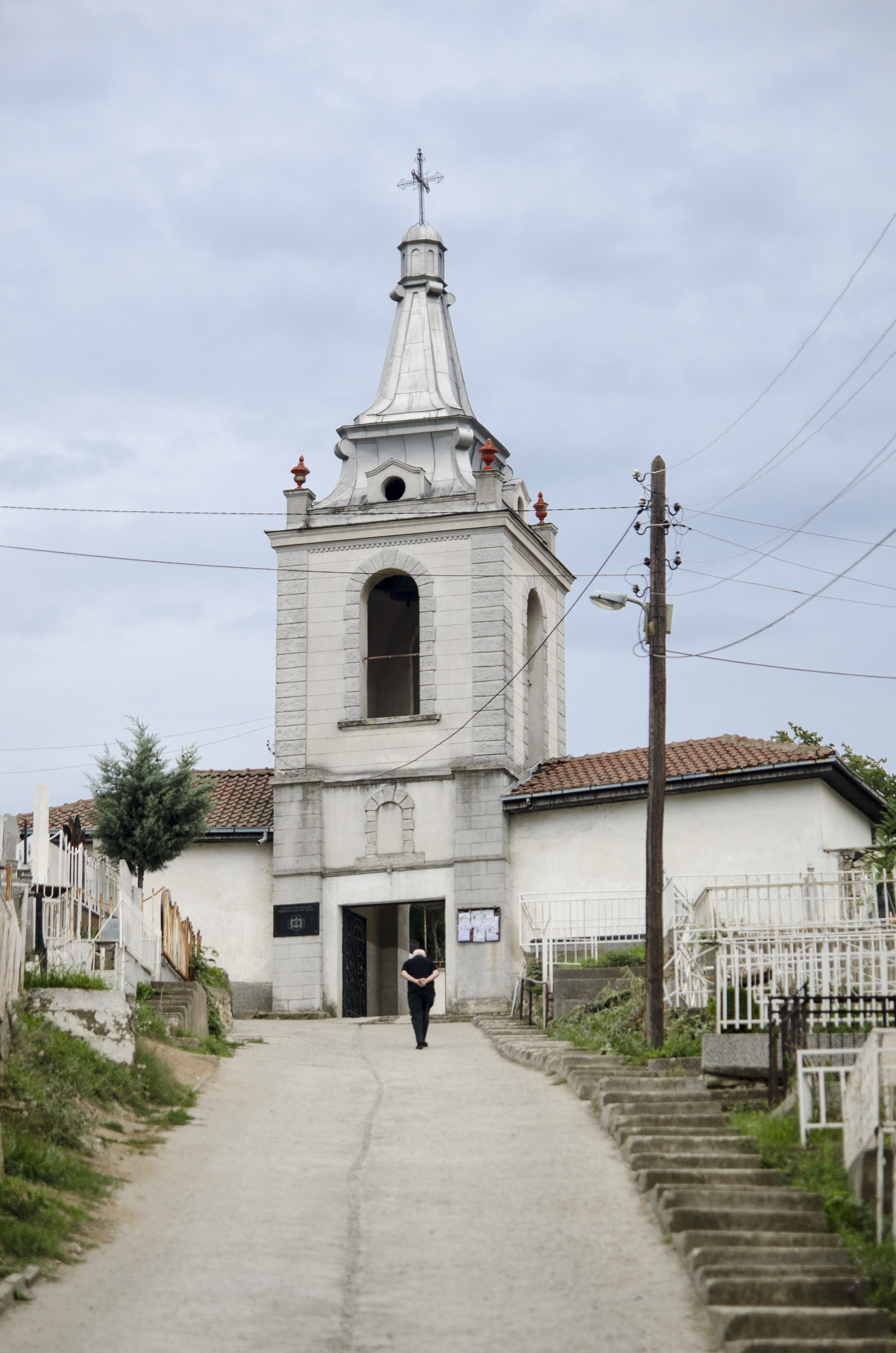 Влезот на црквата Св.Спас, Велес, Р. Македонија.